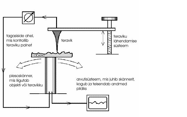 Teravikmikroskoopide tööpõhimõtte skeem